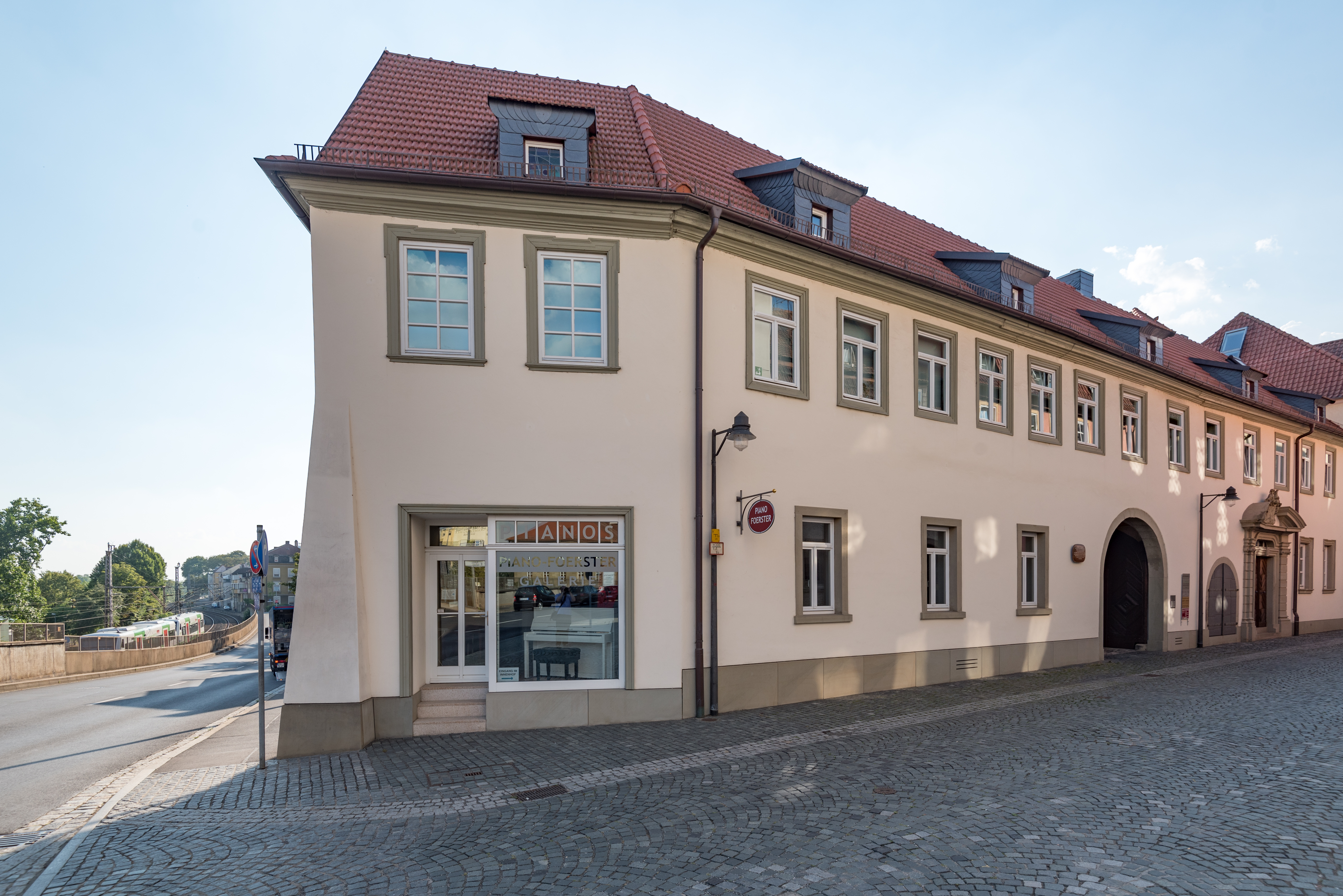 Schweinfurt, Matzgergasse 16